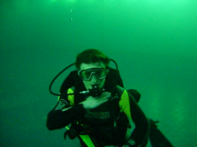 Λίγος αέρας.